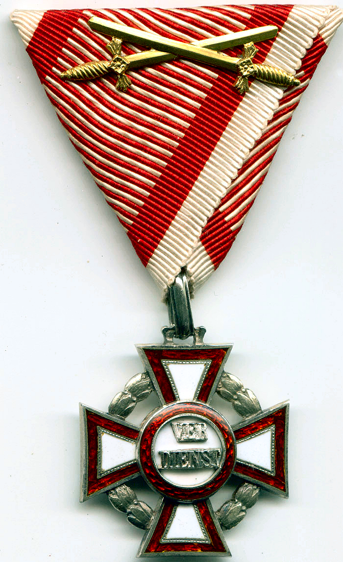 Ordinul de Merit Militar de clasa a 3-a cu decorația de război (KD.) și cu săbii